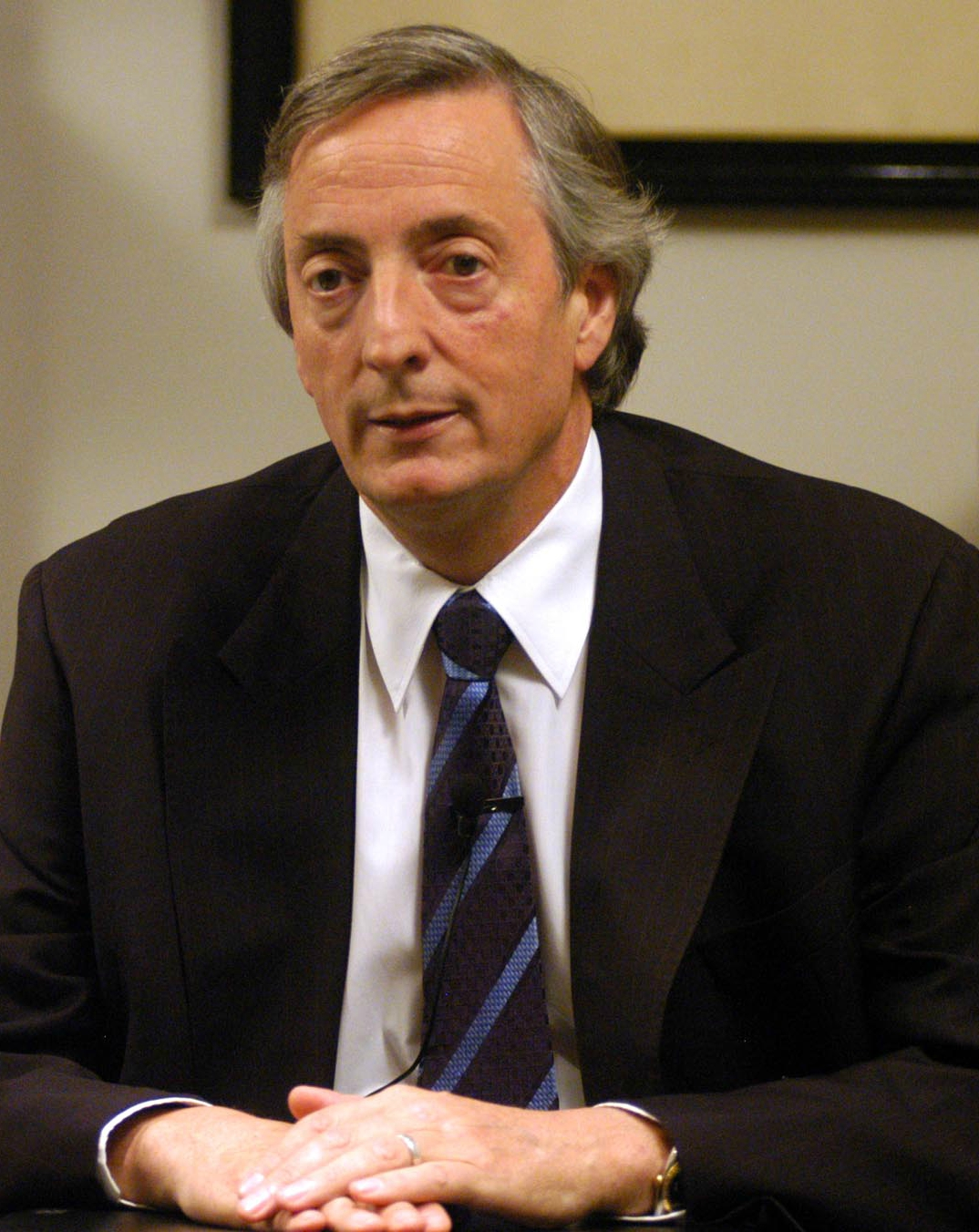 Mensaje del Presidente de la Nacion, Néstor Kirchner, con motivo del fallecimiento de S.S. Juan Pablo II.